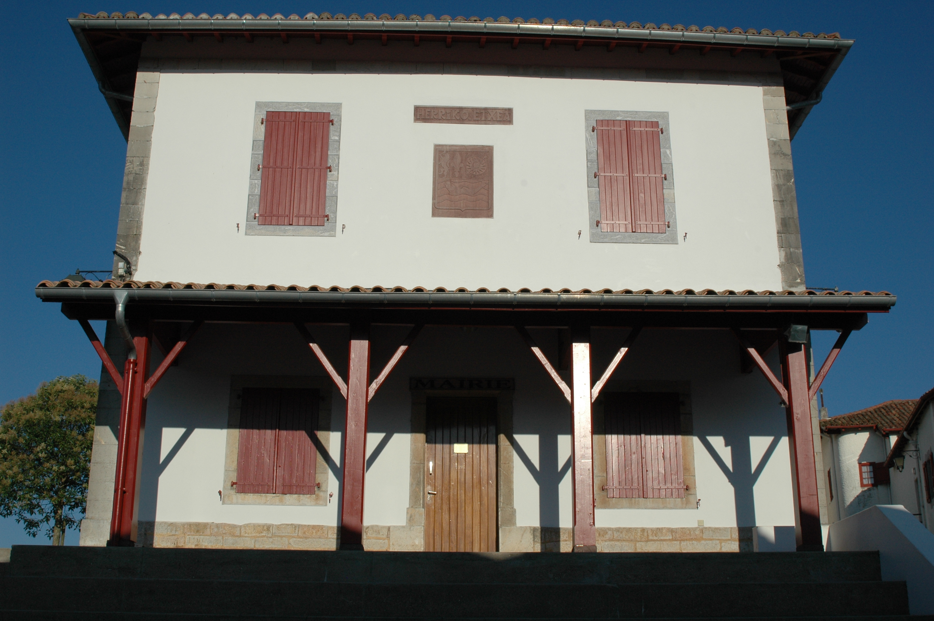 Biriatou, la mairie